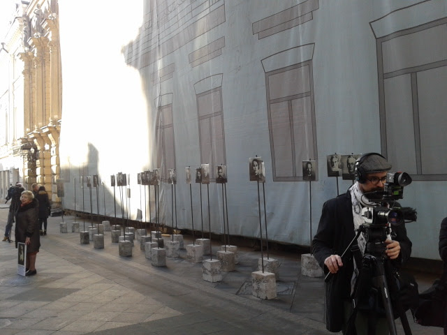 Здание Московской Ремесленной Управы (в основе - палаты И.Н.Хованского, вторая половина XVII в., и дом Шереметевых, 1790-е гг.): Никольская ул., д. 23, стр. 1-2, Тверской, Центральный округ, Москва